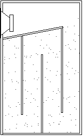 caixa